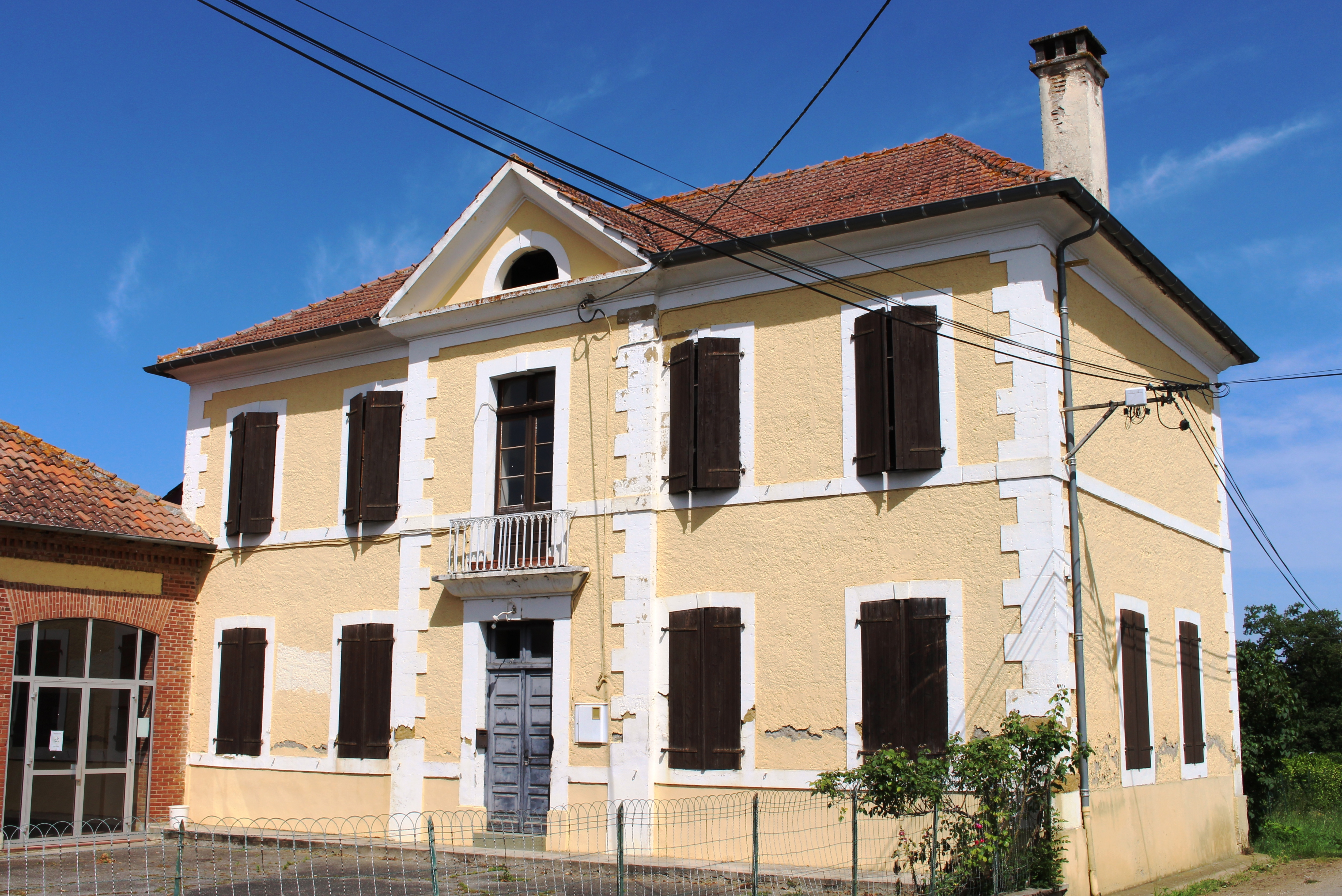 École de Bouilh-Péreuilh (Hautes-Pyrénées)